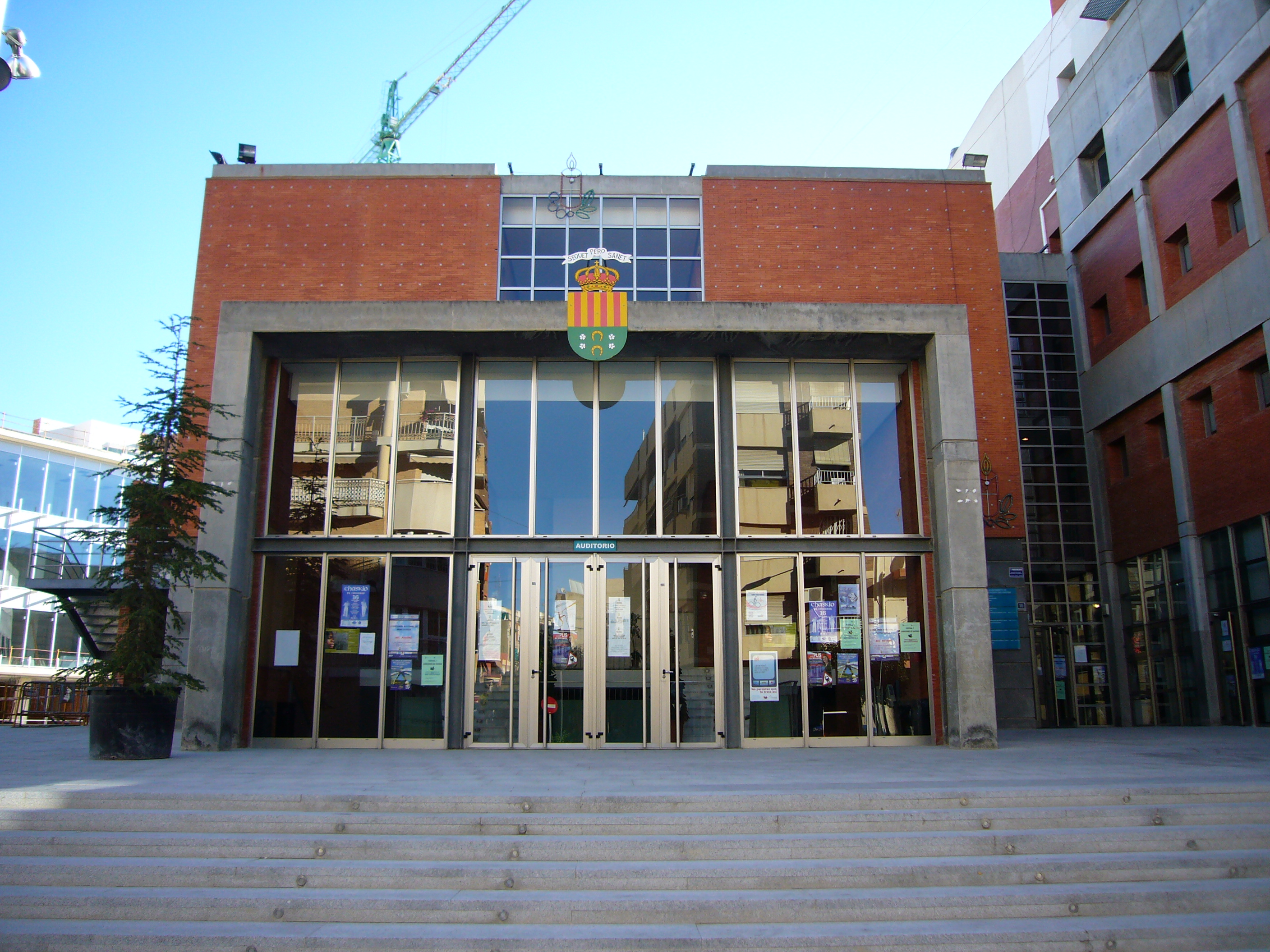 Auditorio del Centro Social de San Vicente del Raspeig.